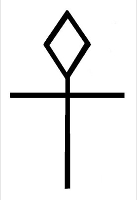 Тамга туркменского племени эймир согласно работе Махмуда аль-Кашгари